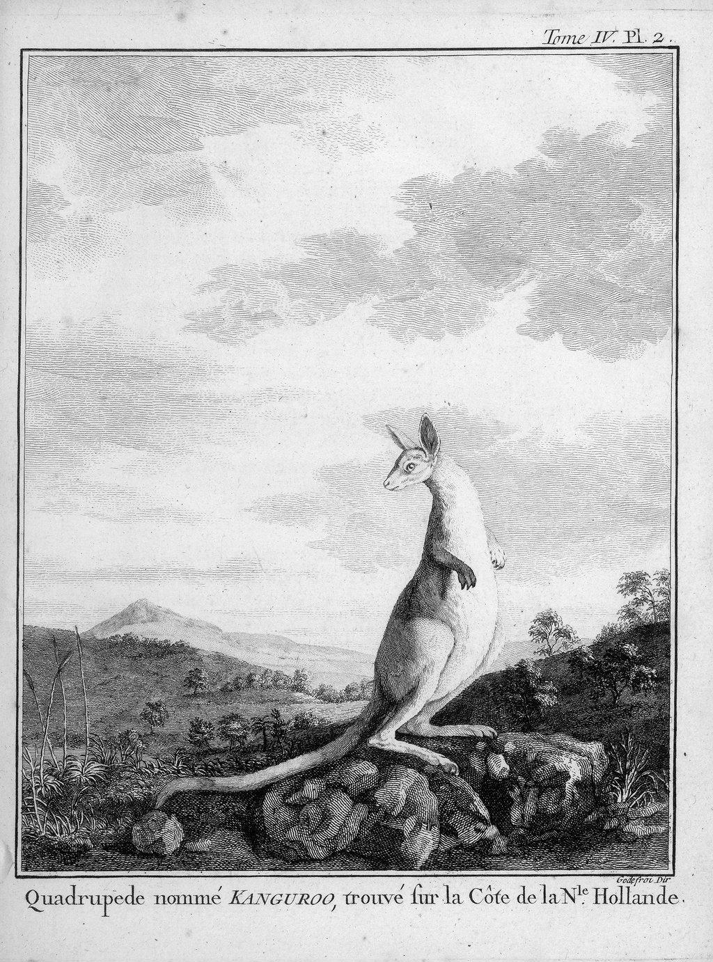 Изображение кенгуру из иллюстраций к журналу плавания на "Эндеворе". Надпись снизу: "Quadrupede nommé Kanguroo, trouvé fur la Côte de la Nle. Hollande." Надпись сверху справа: "Tome IV. Pl. 2.". Подпись справа снизу: "Godefroi Dir". Размер: меньше, чем 36 × 65 cm (14.2 × 25.6 in)[1], 23.4 × 18.1 cm (9.2 × 7.1 in)?[2].